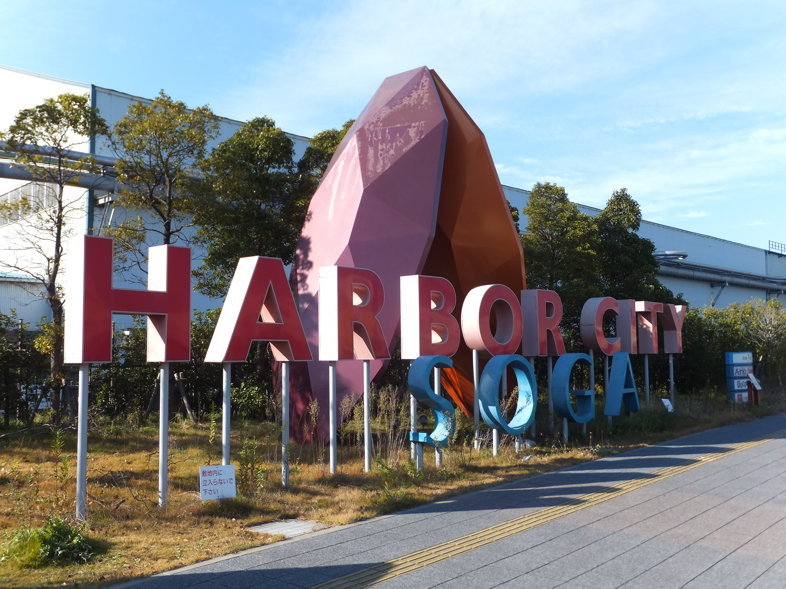 千葉市中央区の蘇我地区にある再開発地区・ショッピングモールハーバーシティ蘇我。